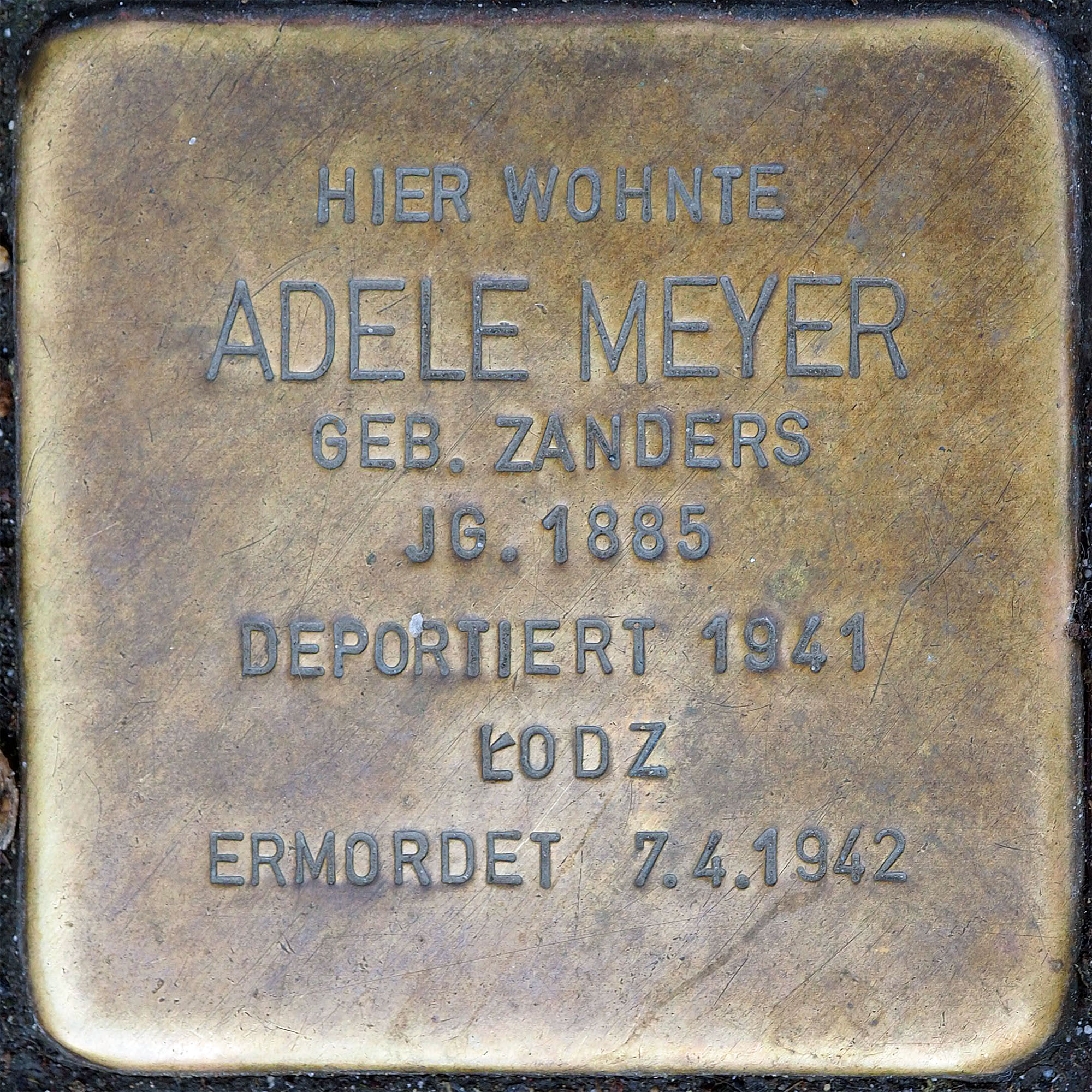 Stolpersteine MG: Meyer, Adele